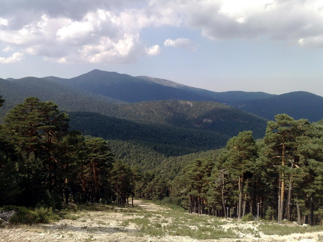 Camino Schmidt- Zona pista de esquí El Bosque.